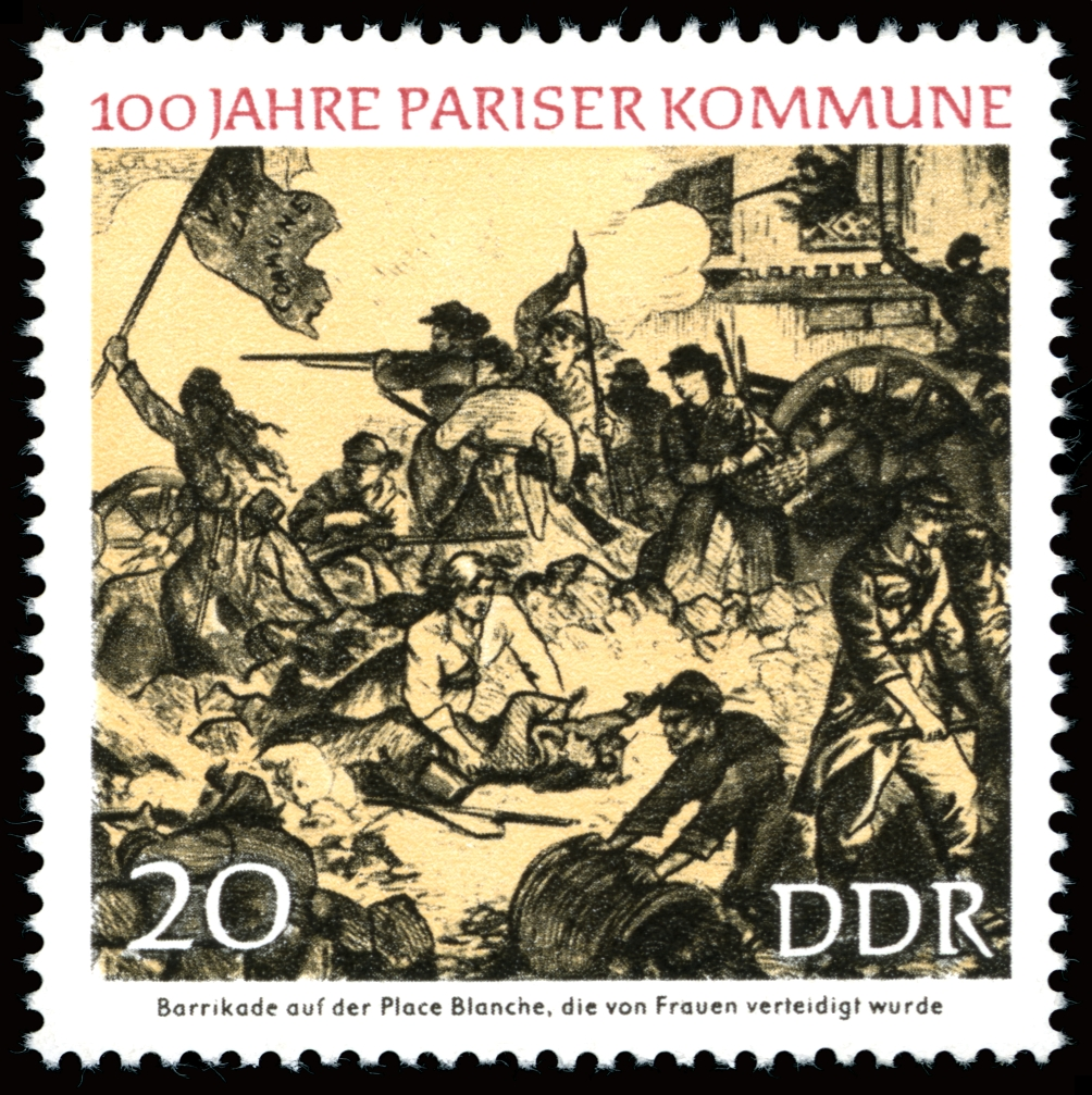 Information: 100 Jahre Pariser Kommune: Von Frauen verteidigte Barrikade auf dem Place Blanche Ausgabepreis: 20 Pfennig First Day of Issue / Erstausgabetag: 9. März 1971 Auflage: 8.000.000 Entwurf: Deutschendorf Druckverfahren: Rastertiefdruck Michel-Katalog-Nr: Ländercode-MiNr: 1656